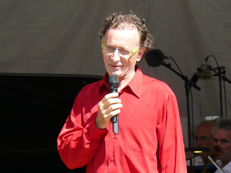 François-René Duchâble en 2010